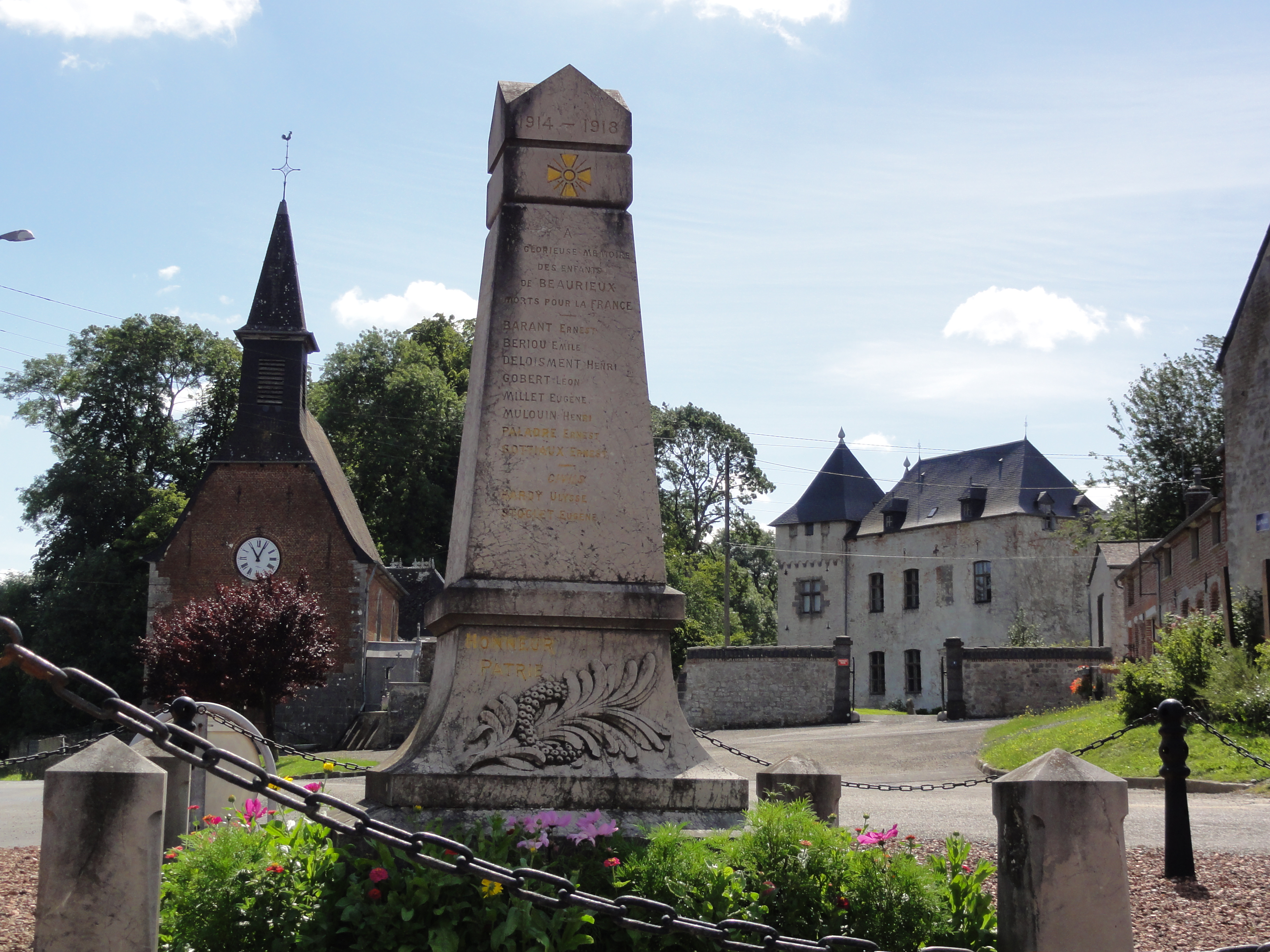 Beaurieux (Nord, Fr) monument aux morts (église, château)